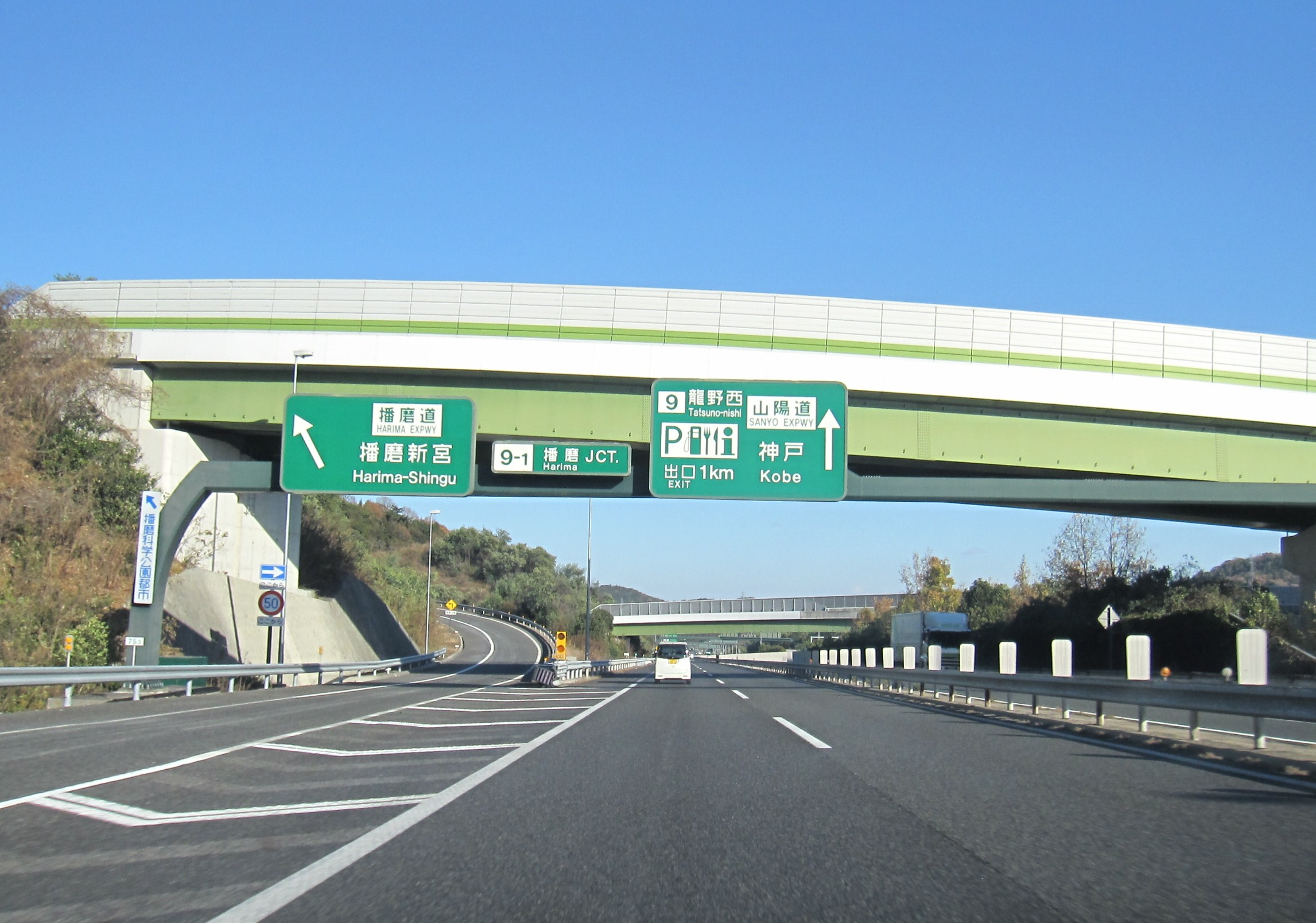 播磨ジャンクション（山陽道上りから）